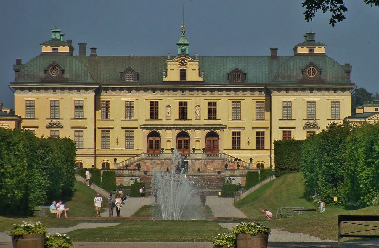 Drottningholmin linna Ekerön kunnassa